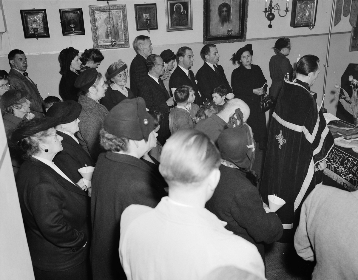 Påskegudstjeneste i det ortodokse kapellet under Majorstuen kirke, 1952